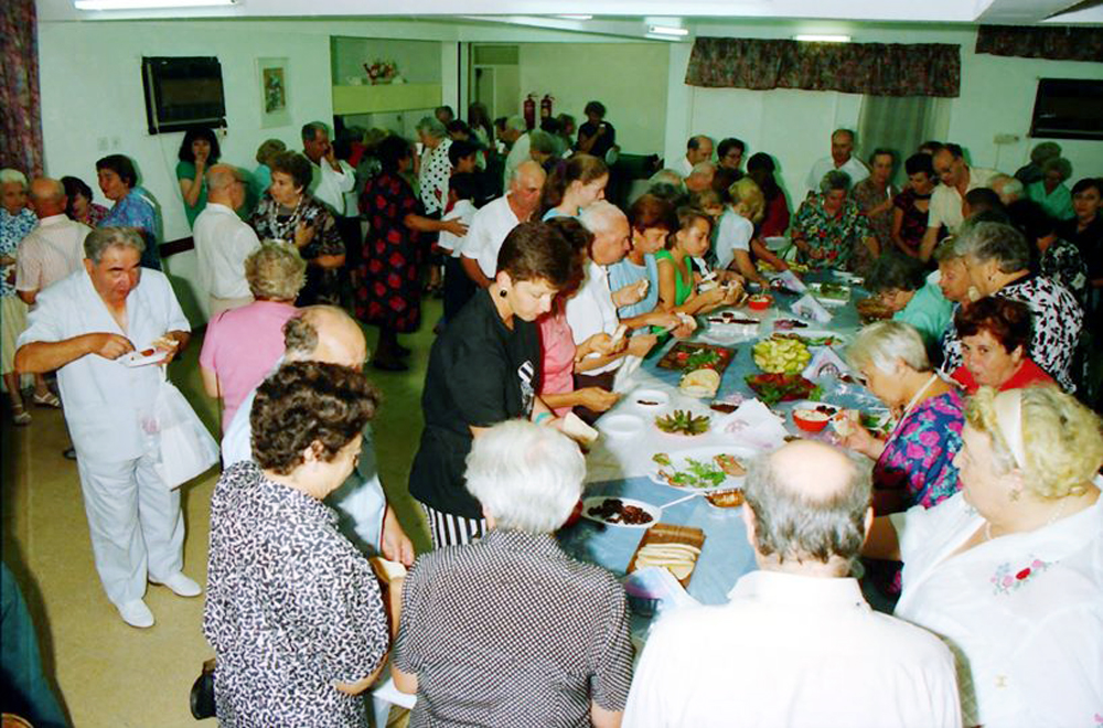 בחסות "ויצו" ערב גיבוש בקרב עולים חדשים שזה עתה עלו לארץ